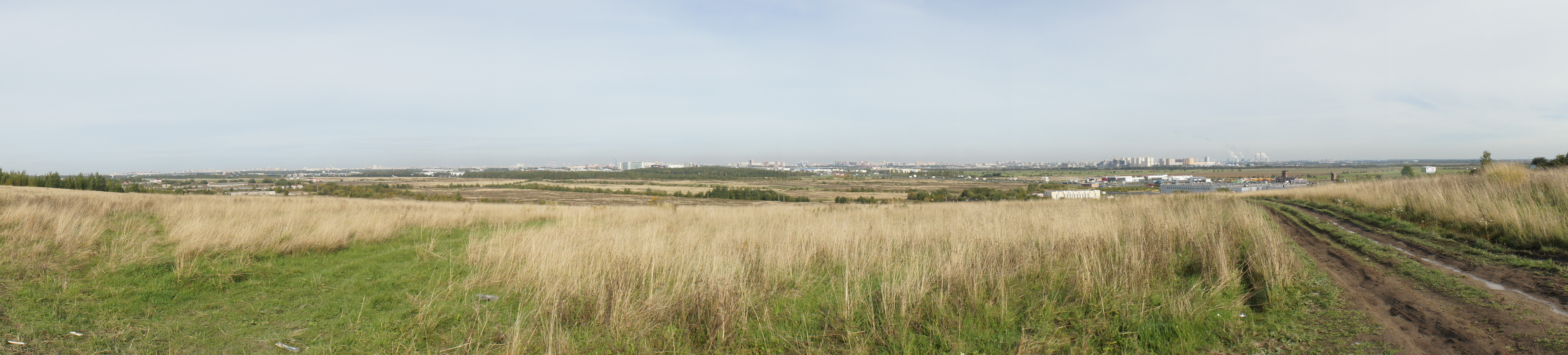 Панорама южных районов Санкт-Петербурга с Пулковских высот